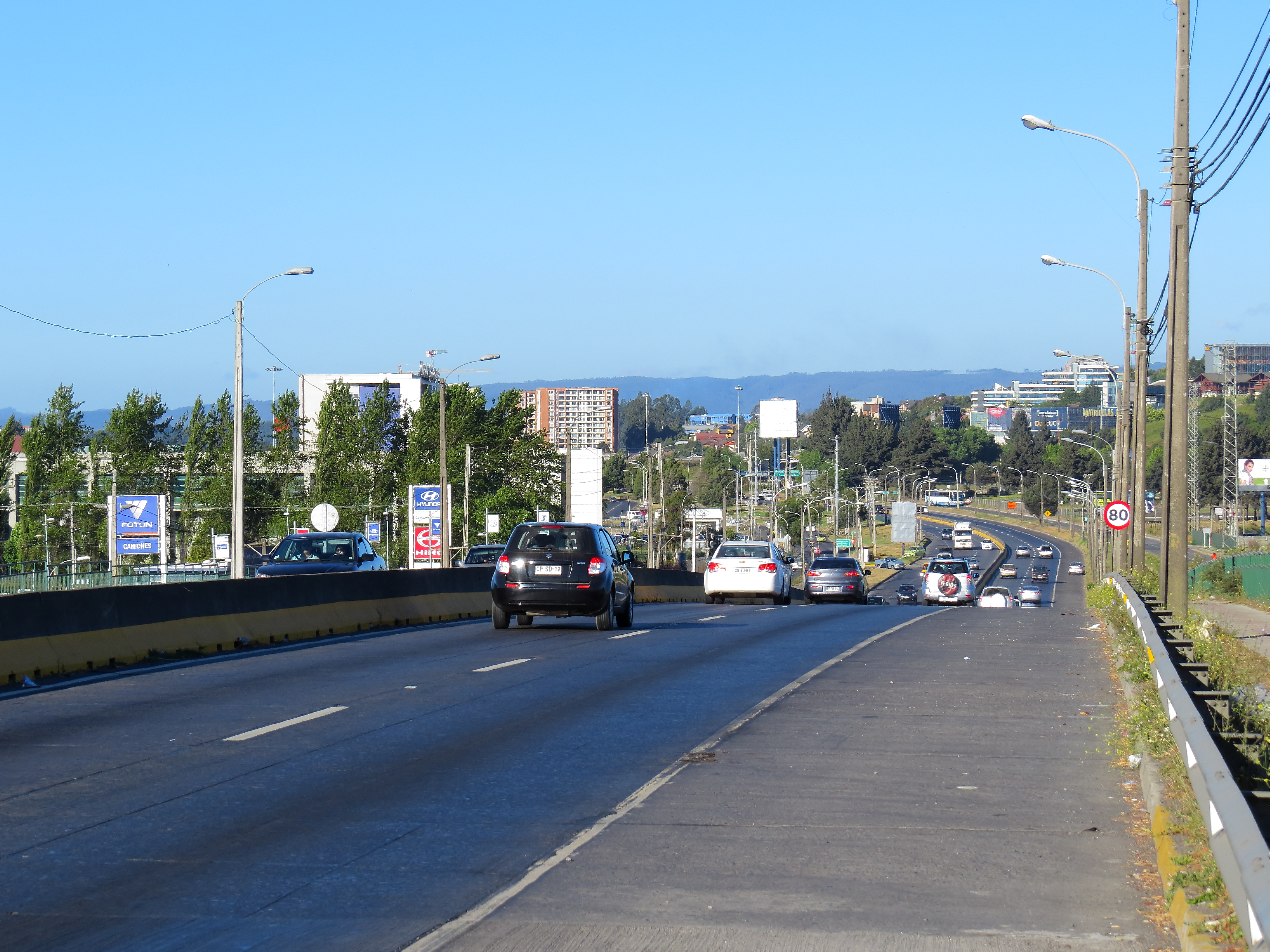 Avenida Jorge Alessandri Concepción